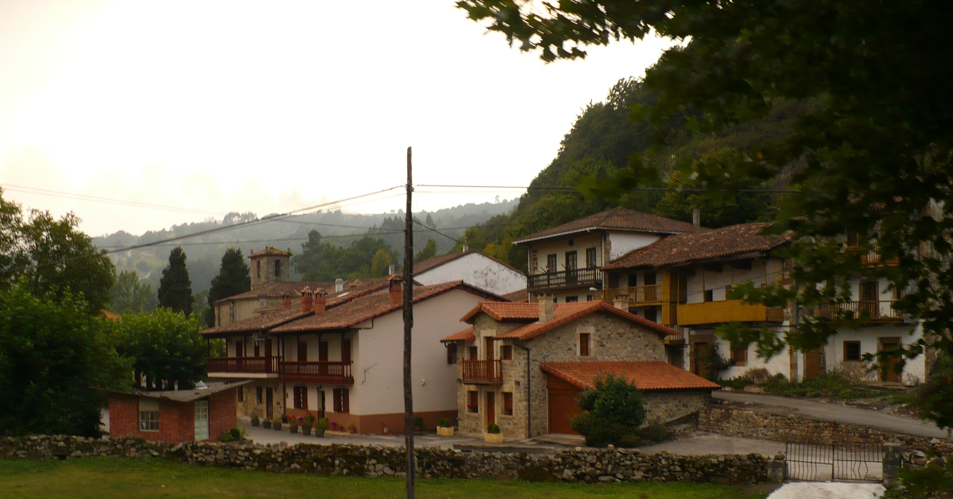 Entrambasmestas, Cantabria